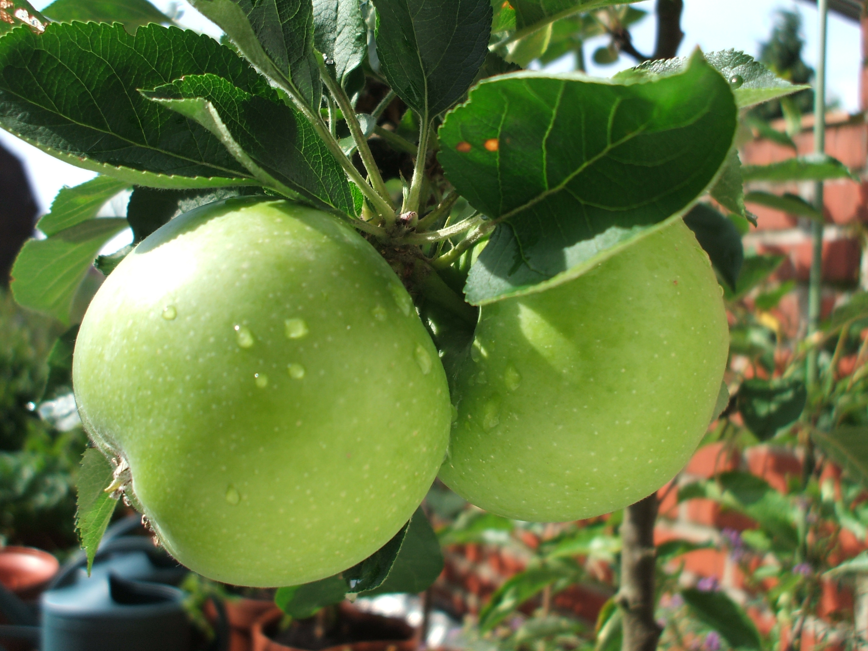 Pommes de Malus ballerina, après la pluie en juillet, jardin de Loos, Nord (France).